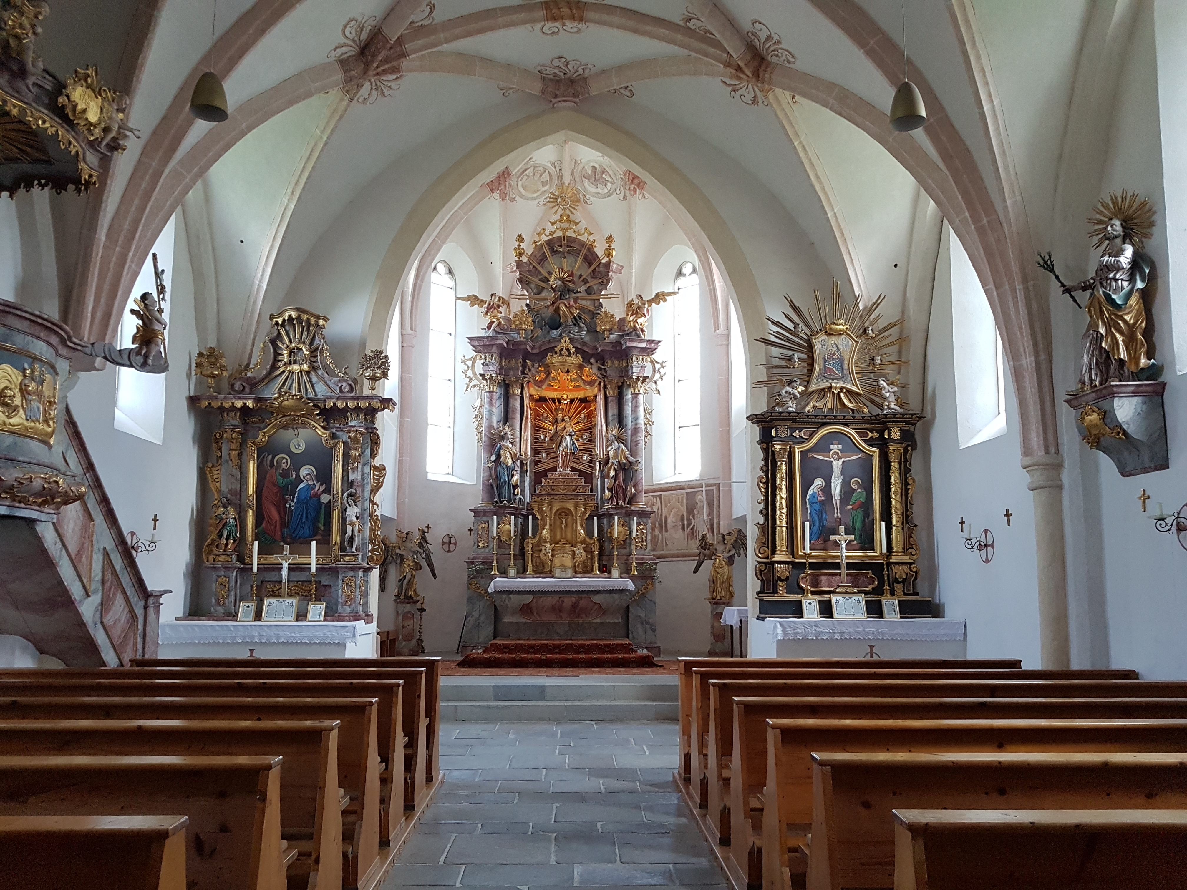 Maria Himmelfahrt (Kirchhof)